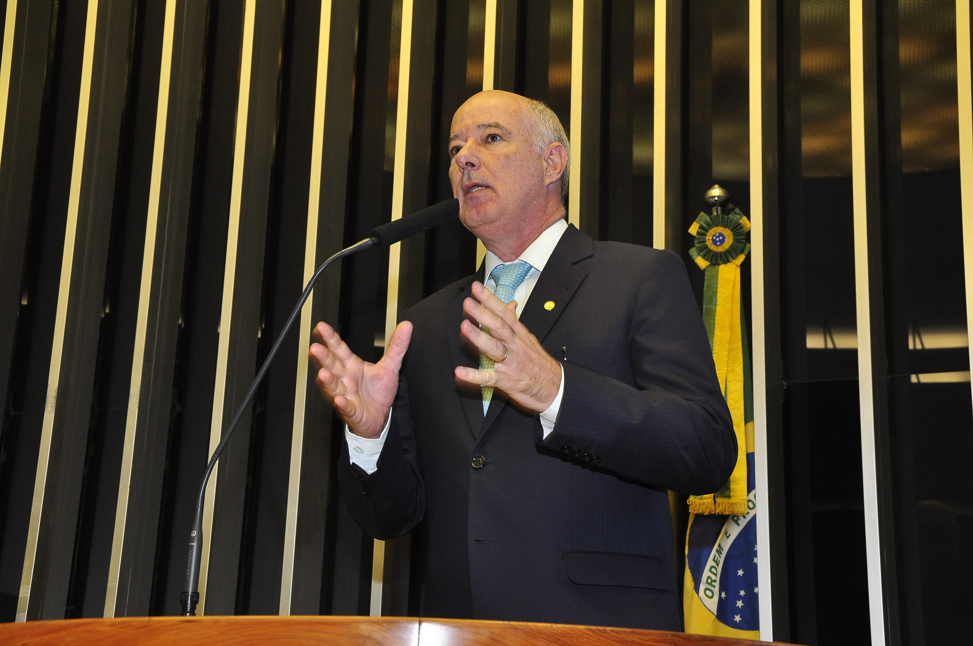 Deputado Federal Herculano Passos em plenário da Câmara dos Deputados